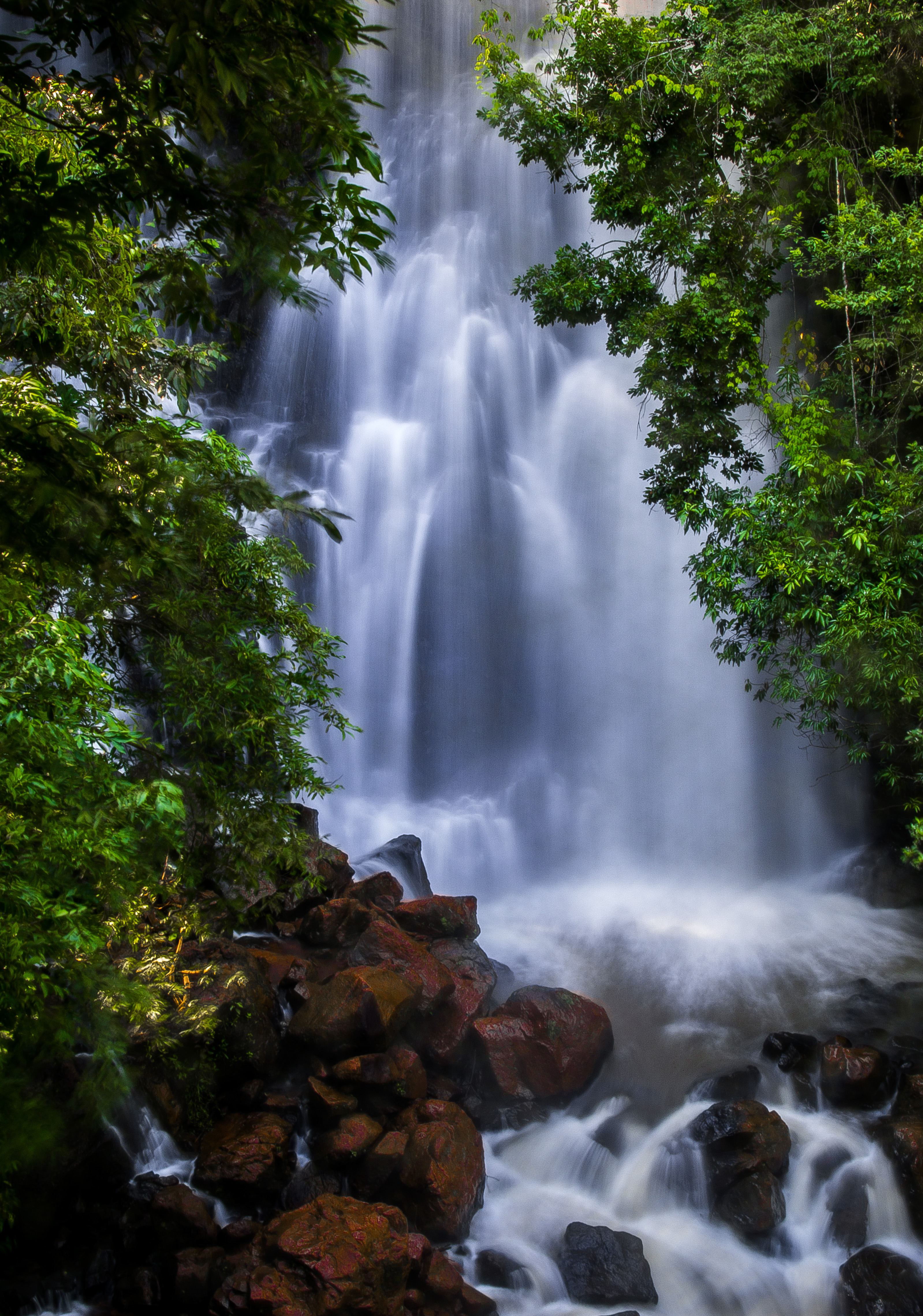 Saltinho do parque natural do Salto do Sucuriú localizado na cidade de Costa Rica no Estado do Mato Grosso do Sul no Brasil.